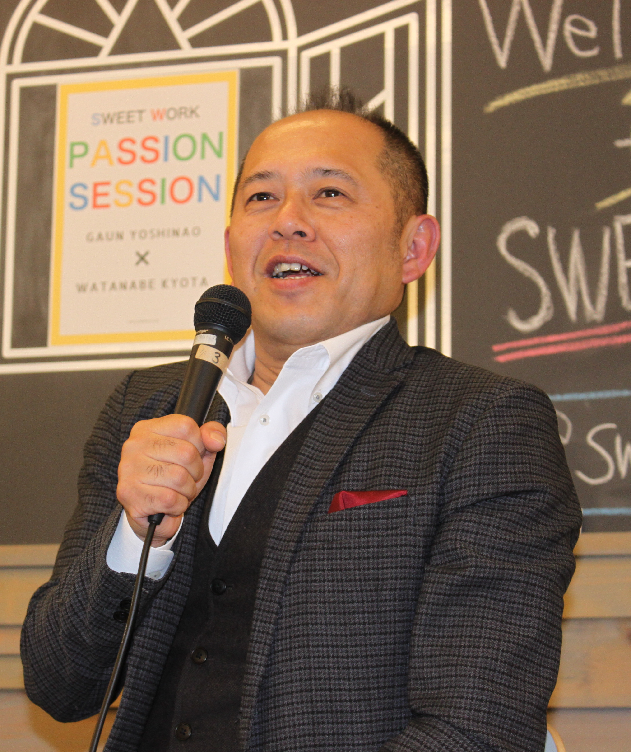 臥雲義尚さんの写真です。